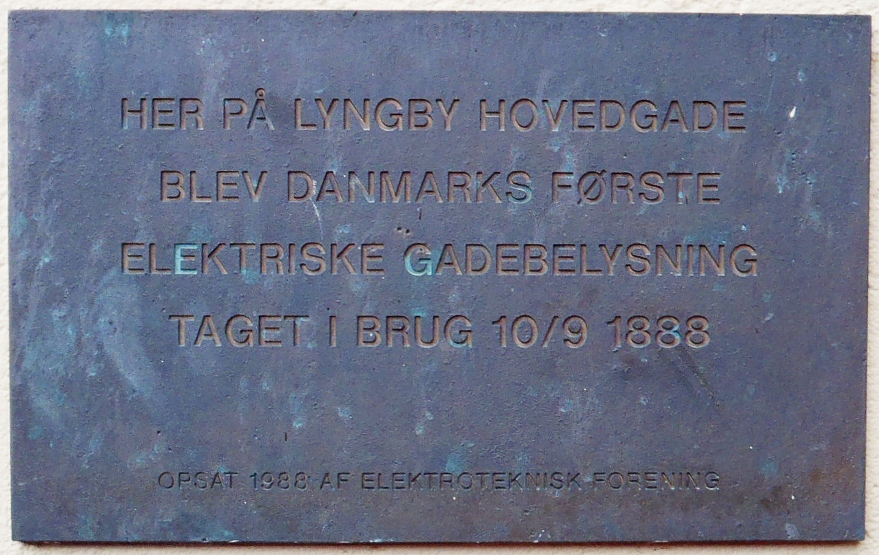 Mindeplade for Danmarks første elektriske gadebelysning på Lyngby Hovedgade, Kongens Lyngby. Indskriften lyder: "Her på Lyngby Hovedgade blev Danmarks første elektriske gadebelysning taget i brug 10/9 1888" og videre "Opsat 1988 af Elektroteknisk Forening".